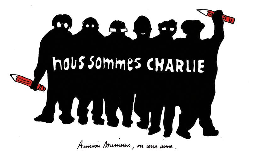 Nous sommes Charlie, par Pauline Aubry - Les étudiants du CESAN rendent hommage